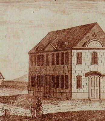 Detail des Originalbilds; originale Bildunterschrift: Ansicht des Katholische Bethauses zu Erlang nebst einen Theil der Altstadt.